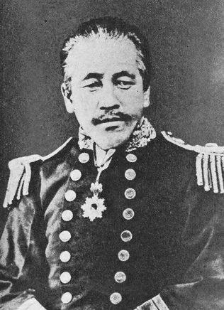 柳楢悦（1832-1891）